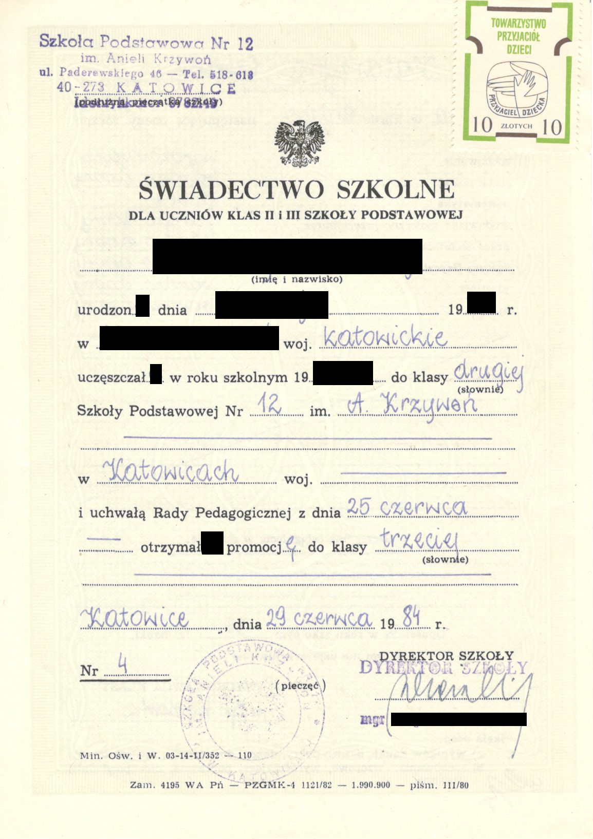 Dawne świadectwo szkolne wydawane w Szkole Podstawowej nr 12 im. Anieli Krzywoń.